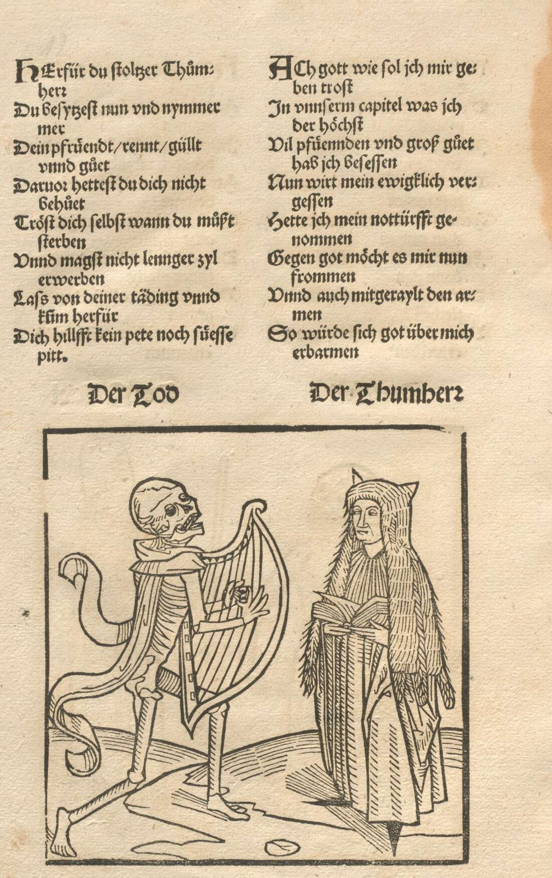 Domherr (Kanoniker) mit übergezogener Almutia (Almutie), einem wärmenden Überhang aus Fell bzw. Pelz